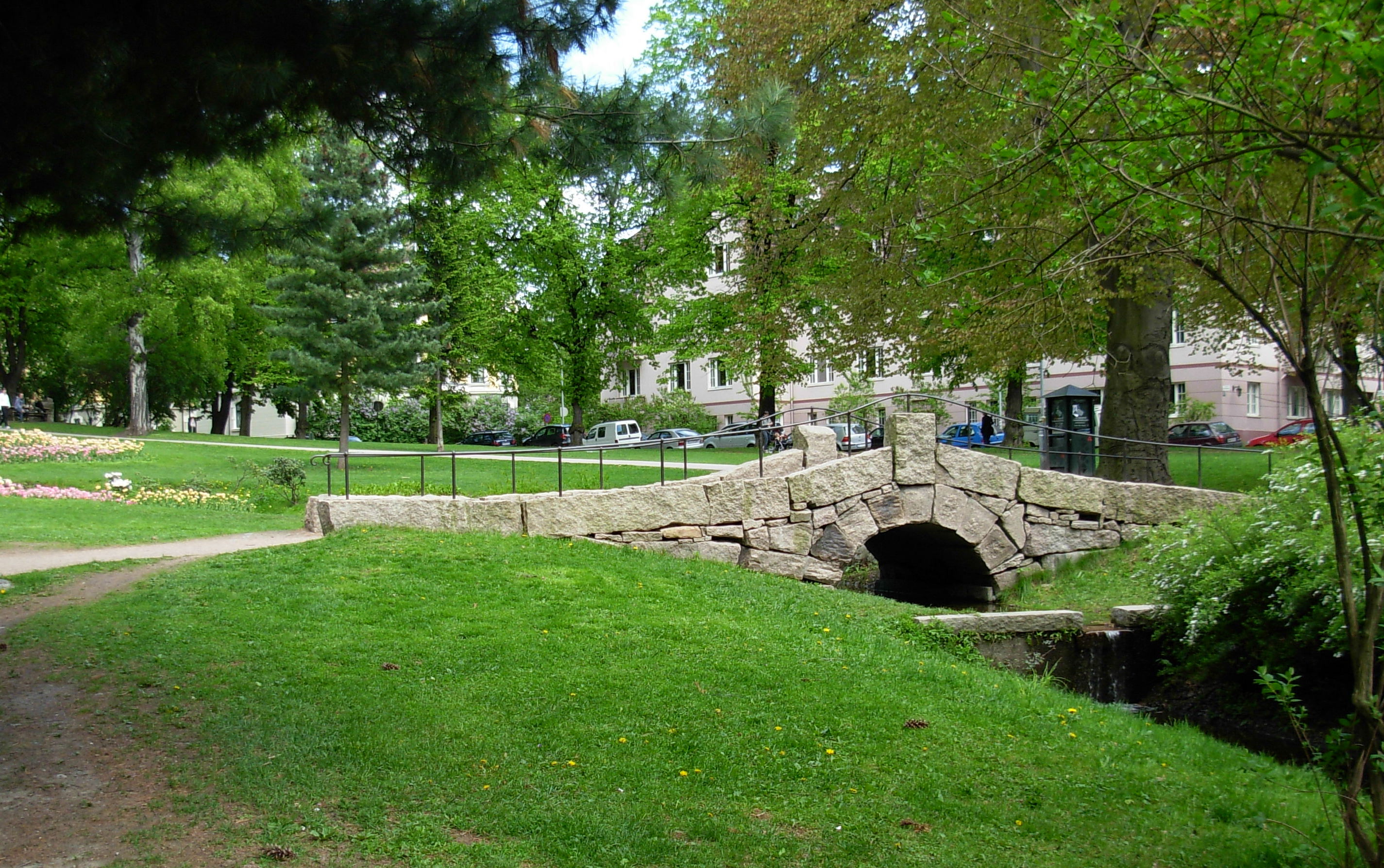 Steinhvelvbrua, St. Hanshaugen park, Oslo